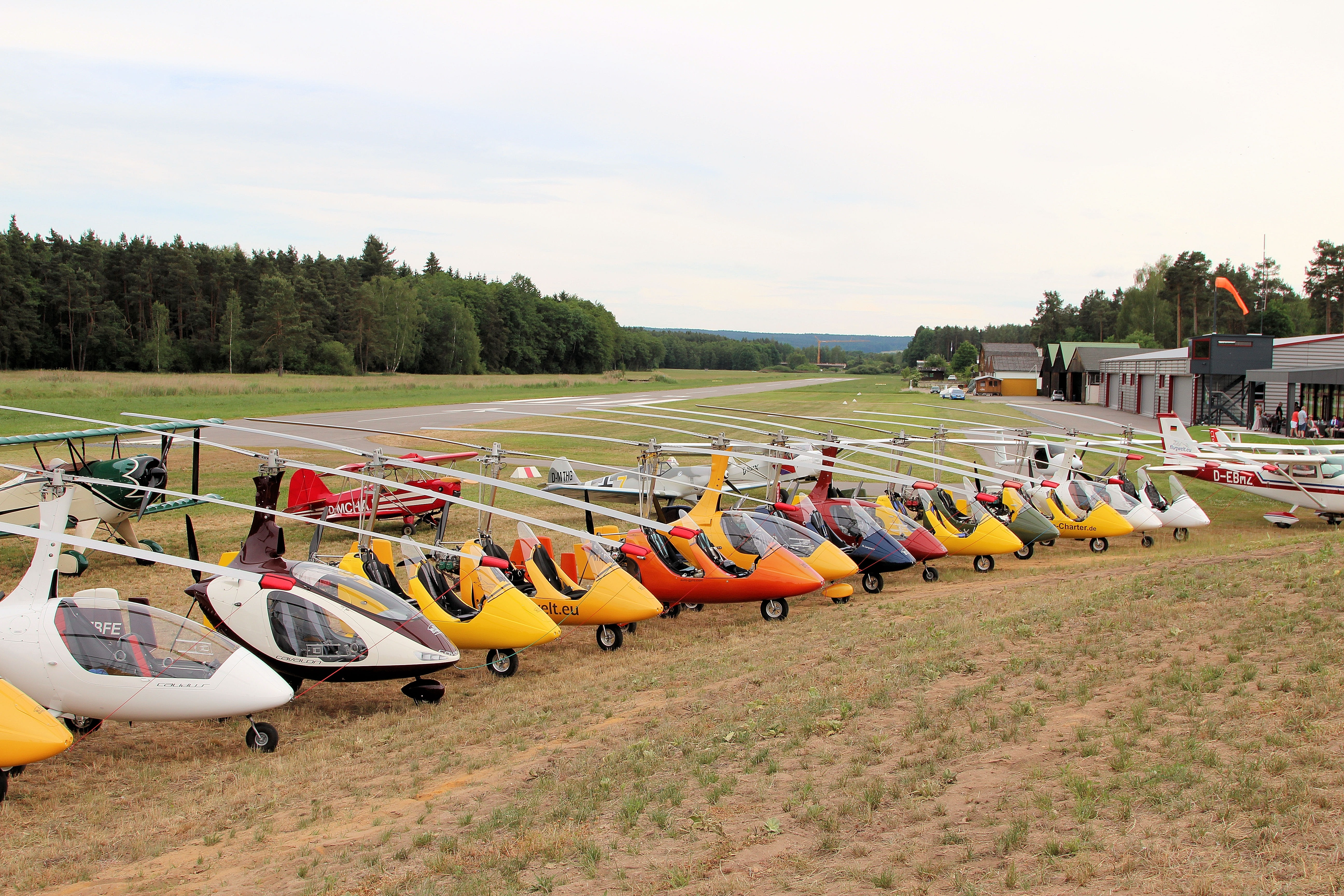 Flugplatz Bruck, Andacht mit Segnung der Flugzeuge am 5. Juni 2017; Bruck, Landkreis Schwandorf, Oberpfalz, Bayern